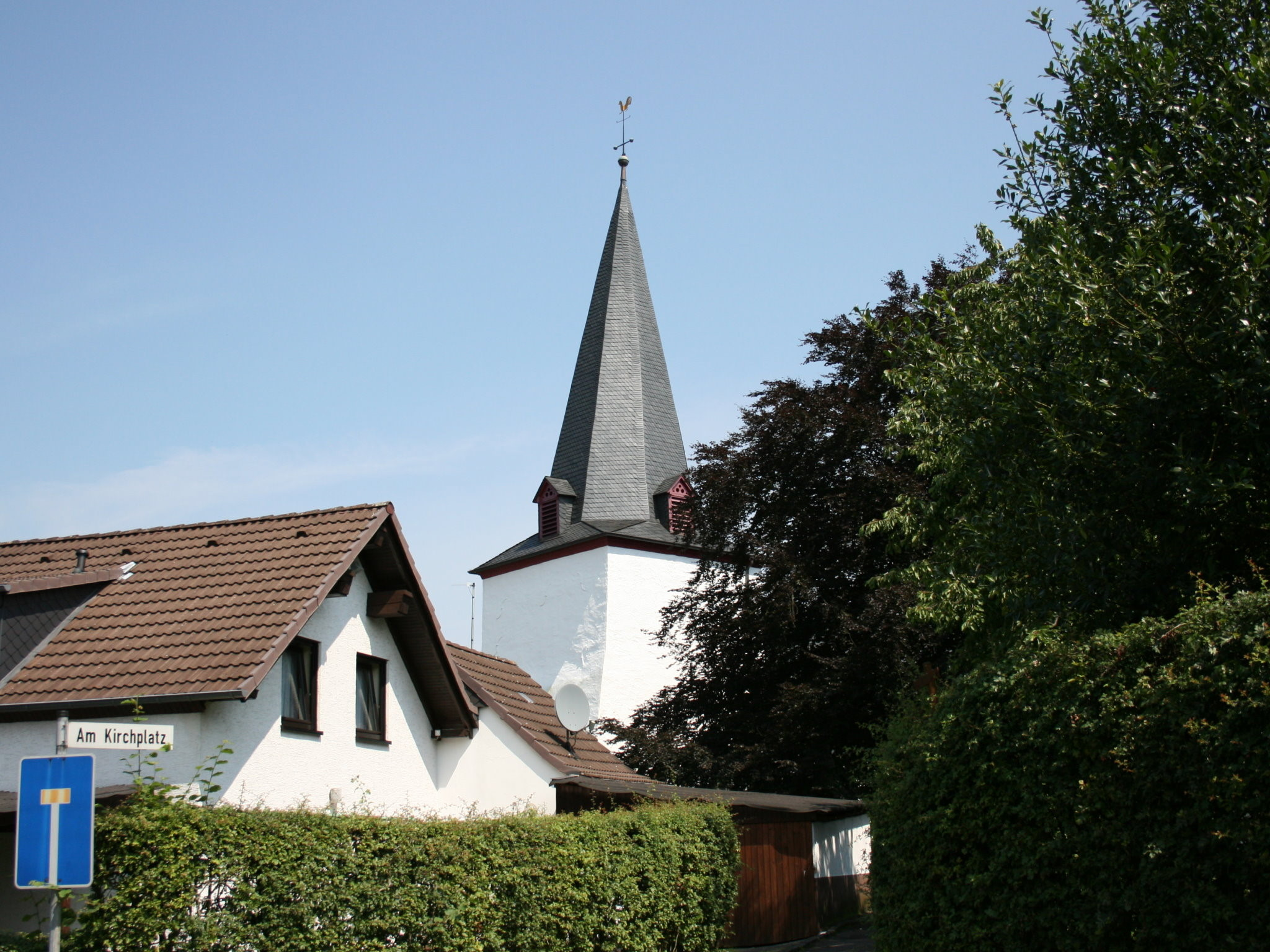 Evangelische Kirche Marienhagen in Wiehl-Marienhagen